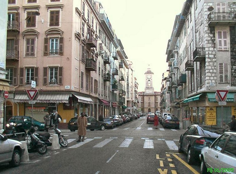 Nice-Riquier - Rue Bavastro